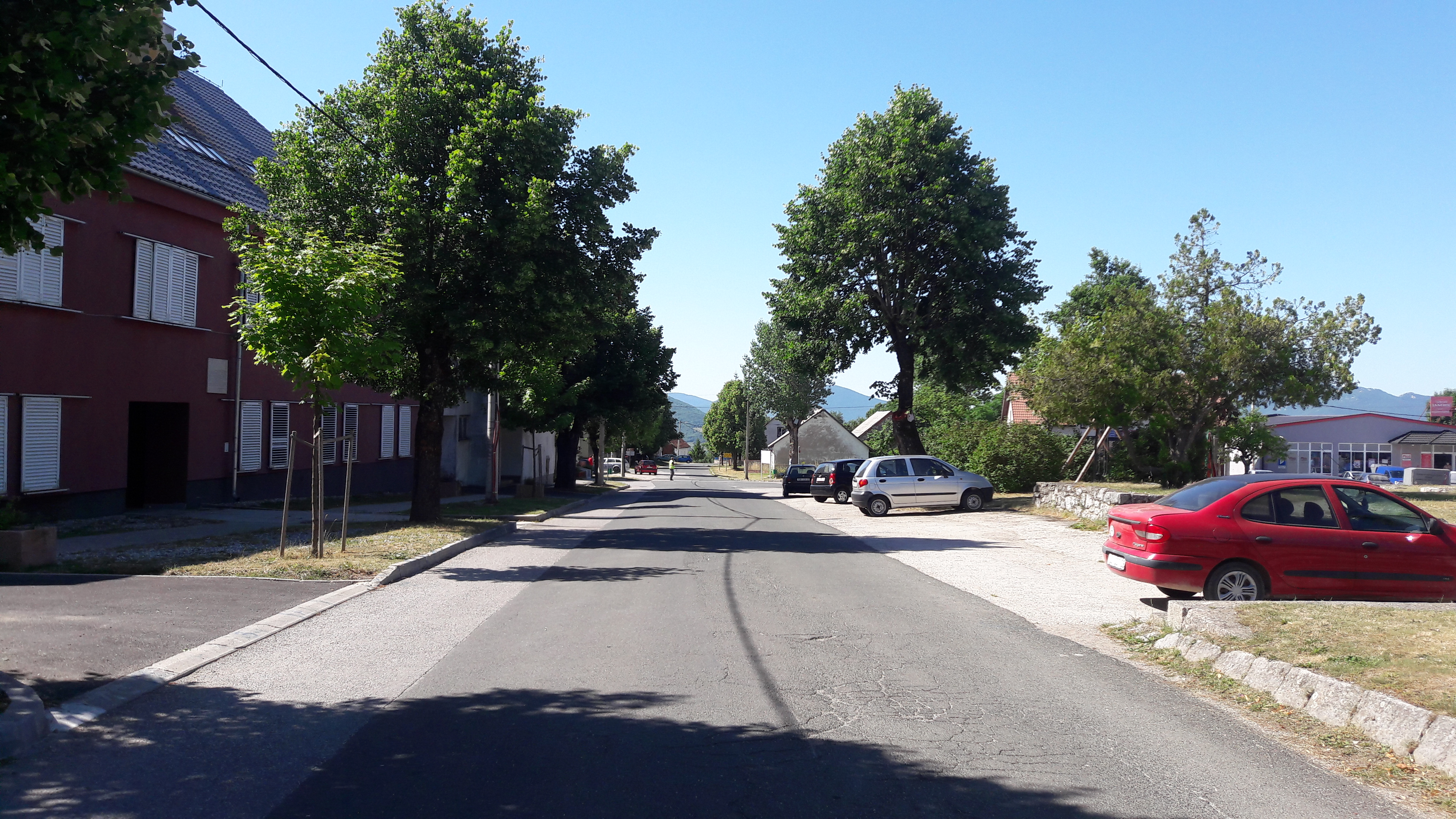 Rruga kryesore në Jutbinë